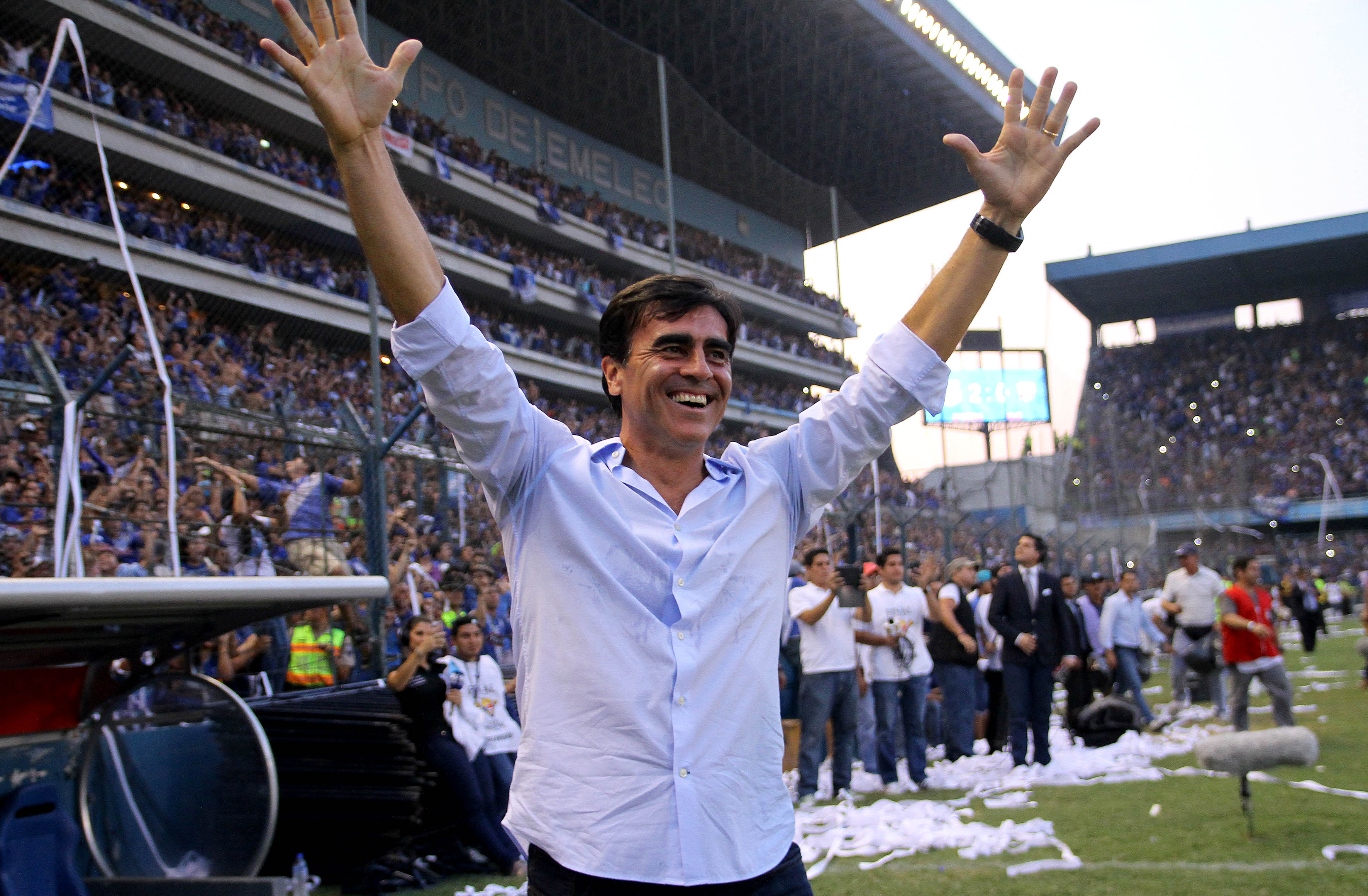 Guayaquil, Ecuador, 21 de diciembre del 2014 (ANDES).-El técnico Gustavo Quinteros, festeja el campeonato de Emelec, luego de ganar 3x0 a Barcelona Foto:César Muñoz/ANDES